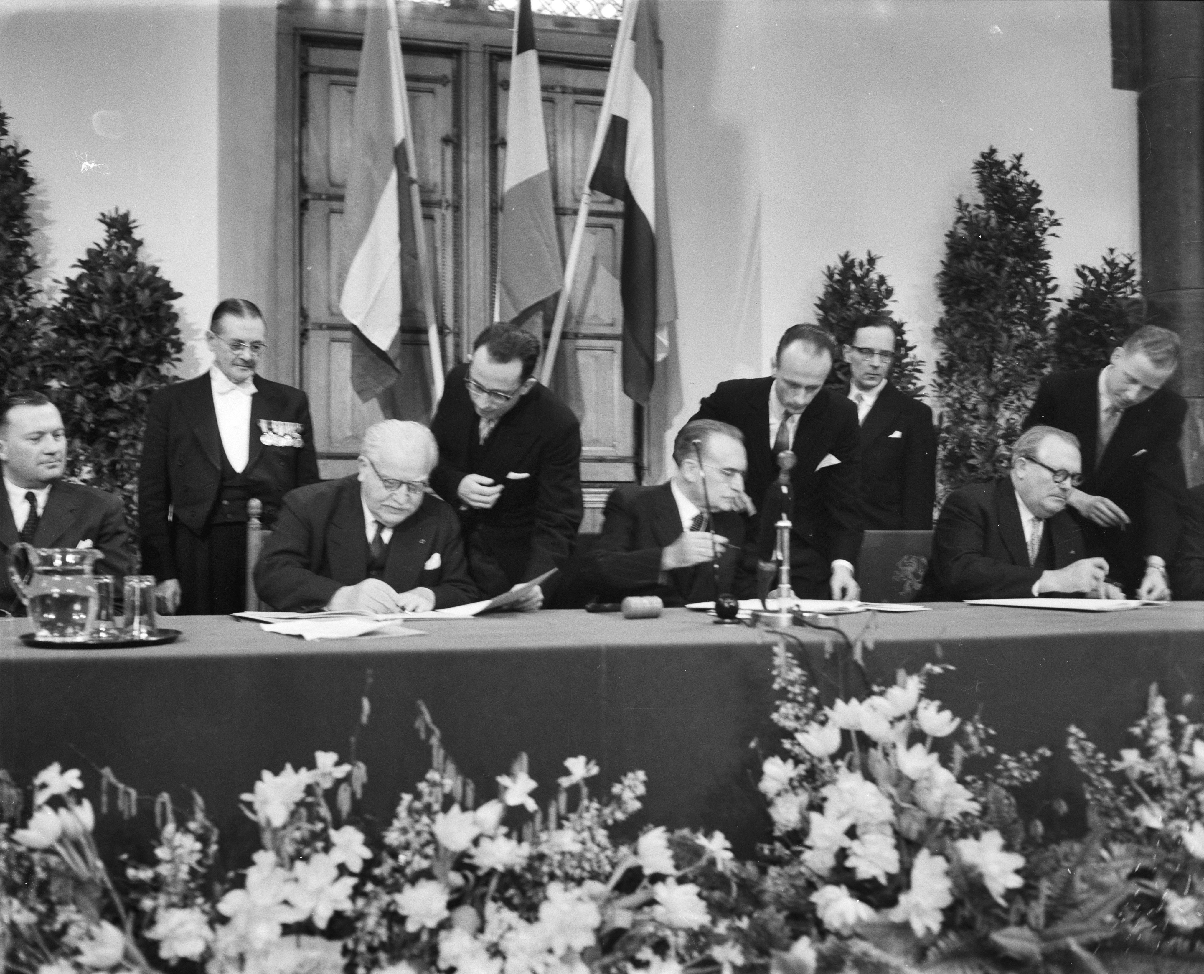 Collectie / Archief : Fotocollectie Anefo Reportage / Serie : [ onbekend ] Beschrijving : Van links naar rechts: Joseph Bech , Dr. Drees en Achilk N. van Acker Datum : 3 februari 1958 Locatie : Den Haag, Zuid-Holland Persoonsnaam : Achilk N. van Acker, Bech Joseph, Drees, W. Fotograaf : Bilsen, Joop van / Anefo Auteursrechthebbende : Nationaal Archief Materiaalsoort : Negatief (zwart/wit) Nummer archiefinventaris : bekijk toegang 2.24.01.04 Bestanddeelnummer : 909-3036